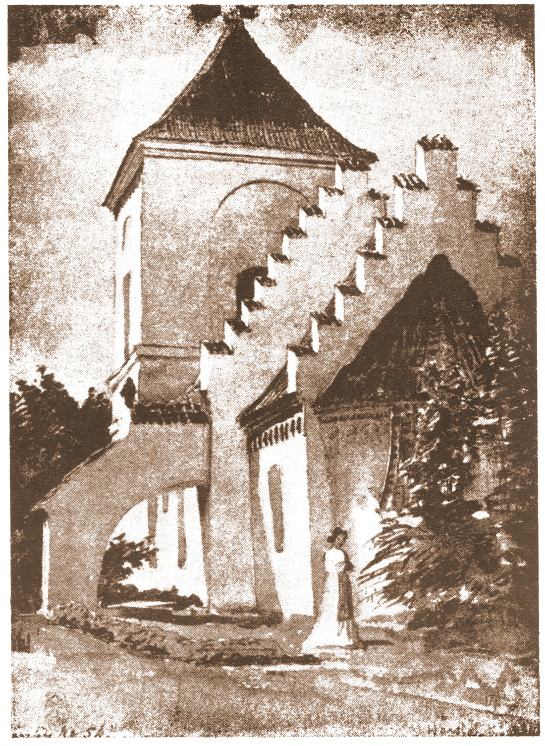 Håslövs medeltidskyrka. Akvarell av A.T. Gellerstedt 1866.